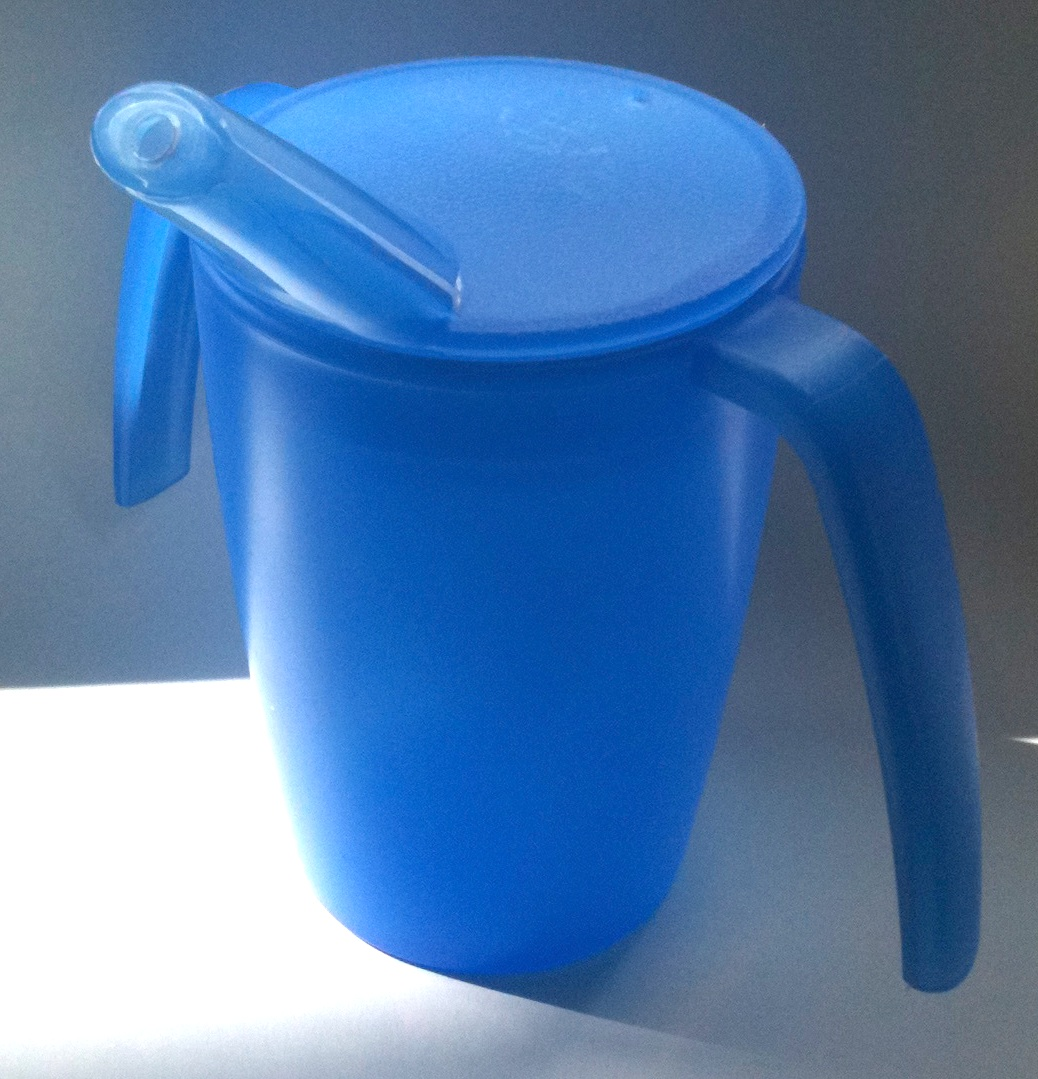 Becher mit Schnabelaufsatz und Griffen